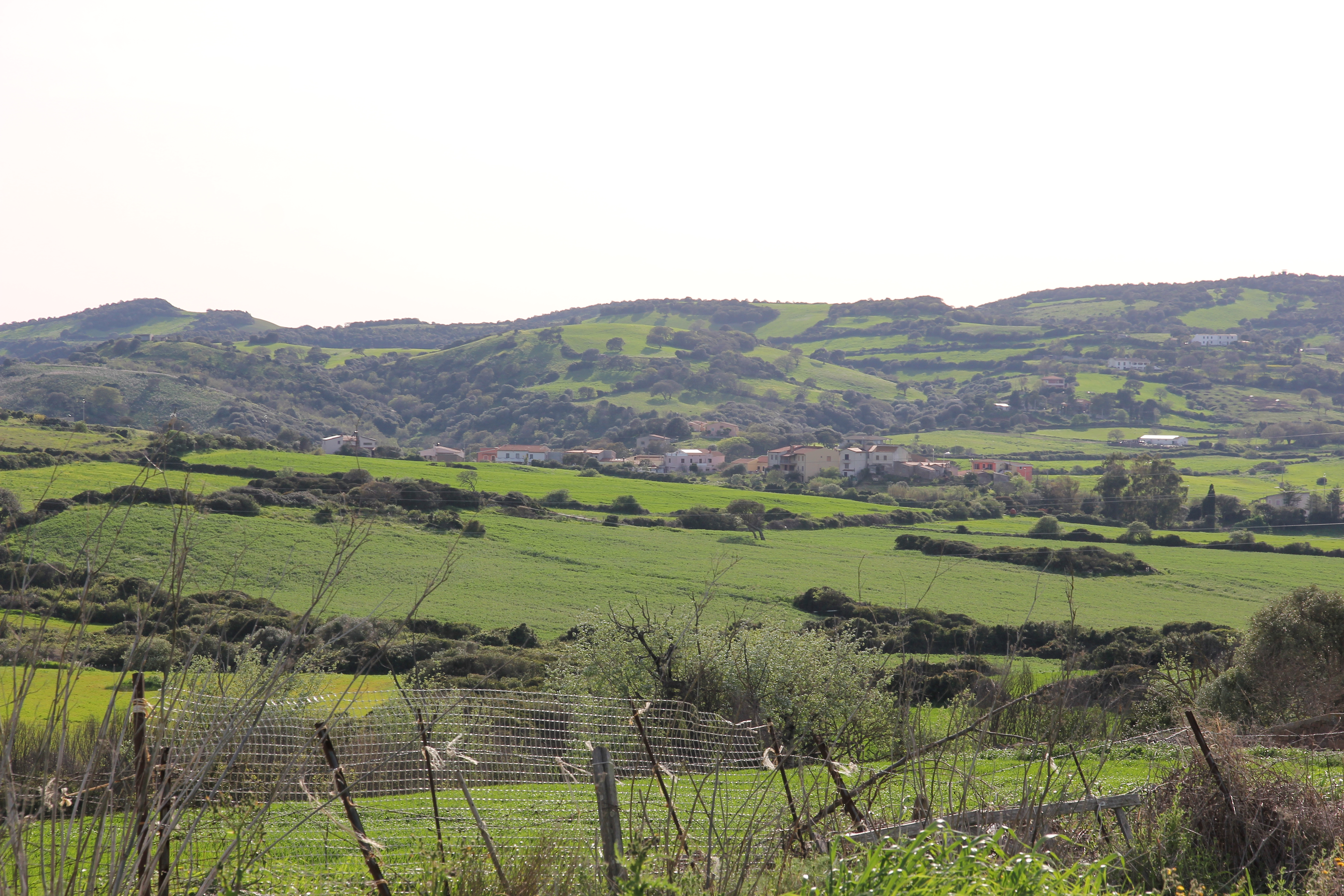 Tergu, frazione Pulpaggiu